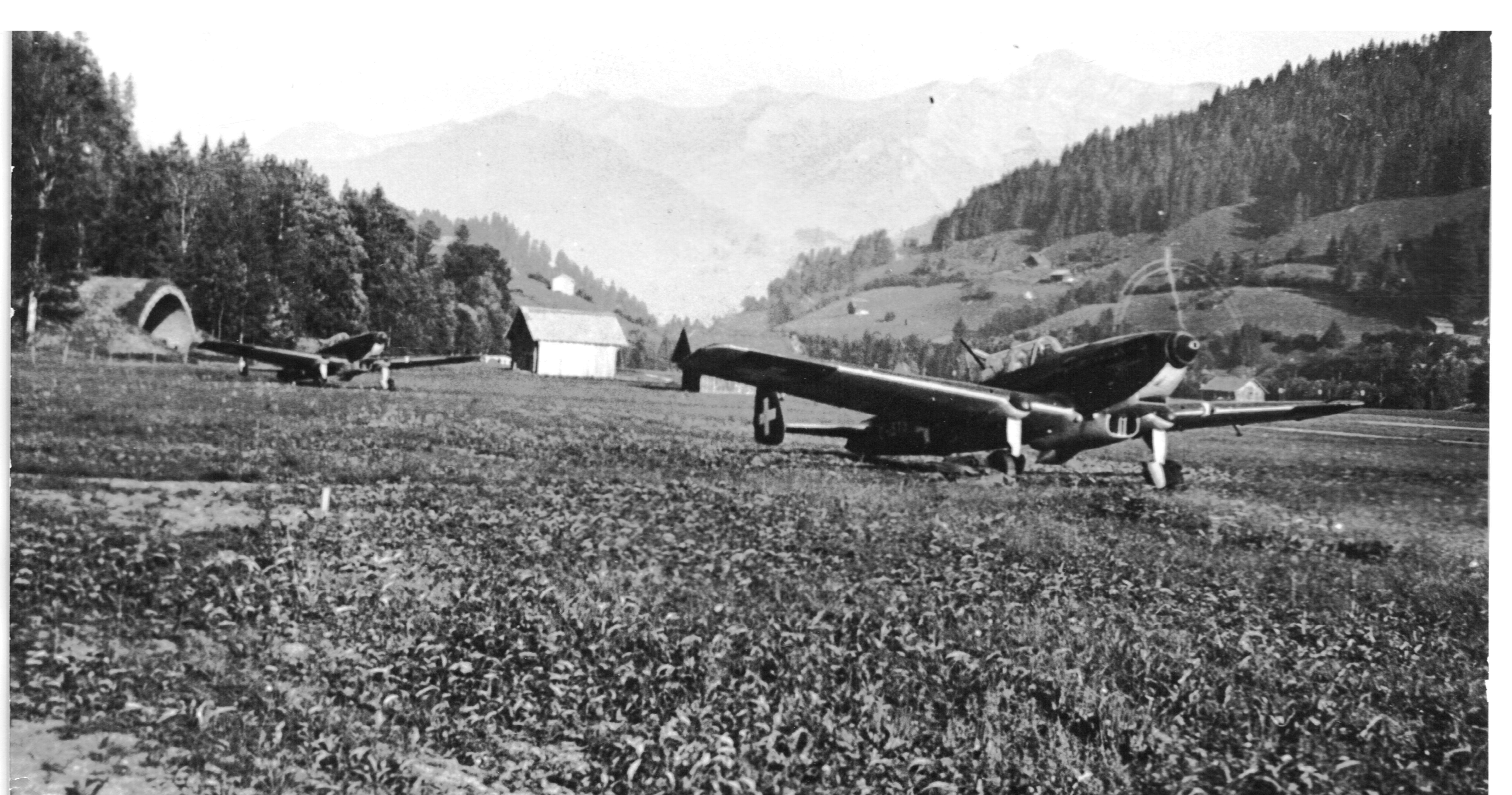 Avion de reconnaissance et de combat EKW C-3603